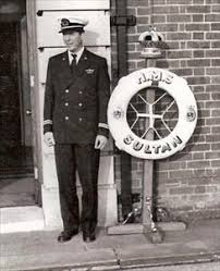 עמוס דגן - בריטניה